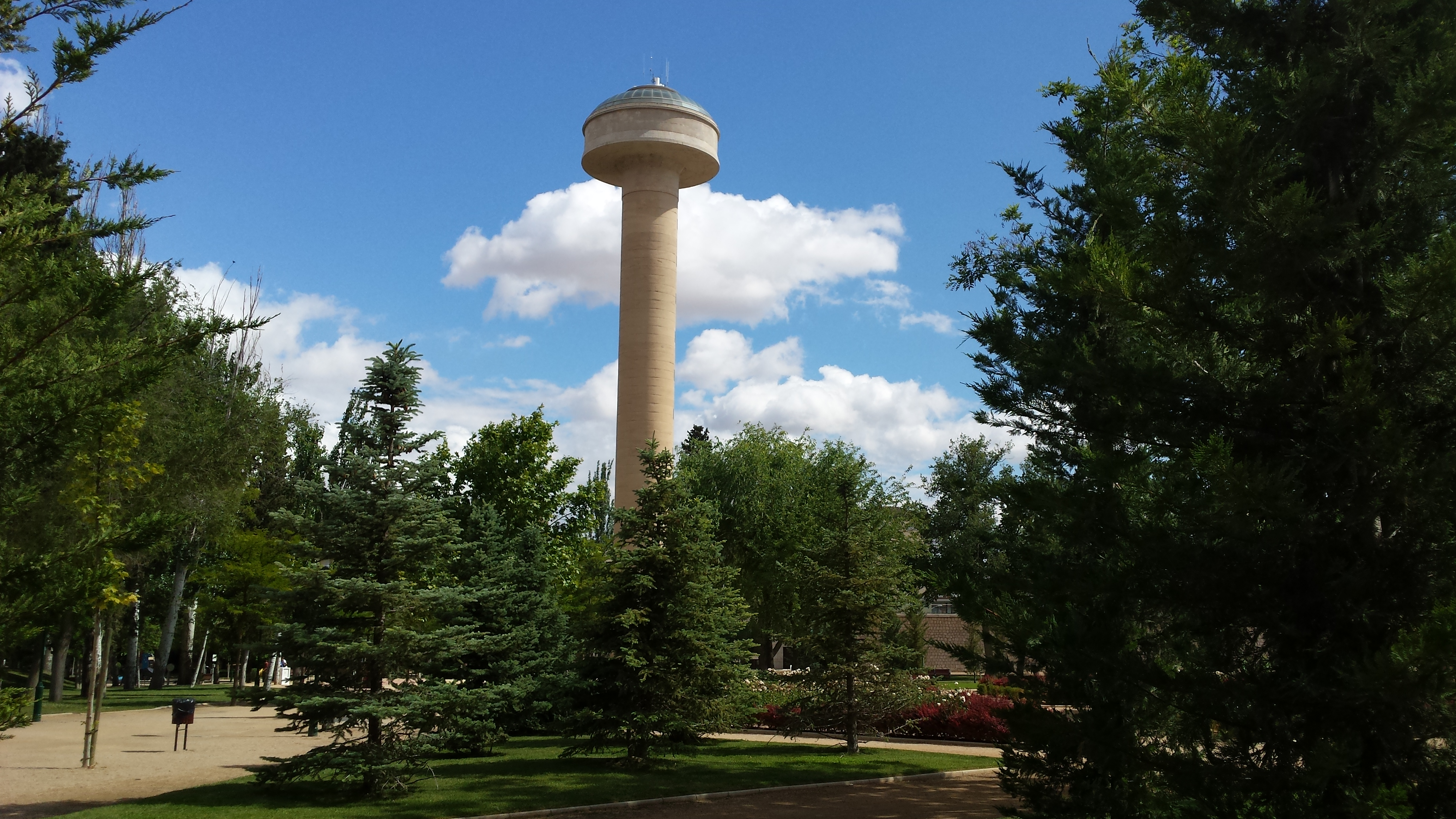 Depósito de Agua de la Fiesta del Árbol. Parque de la Fiesta del Árbol. Albacete